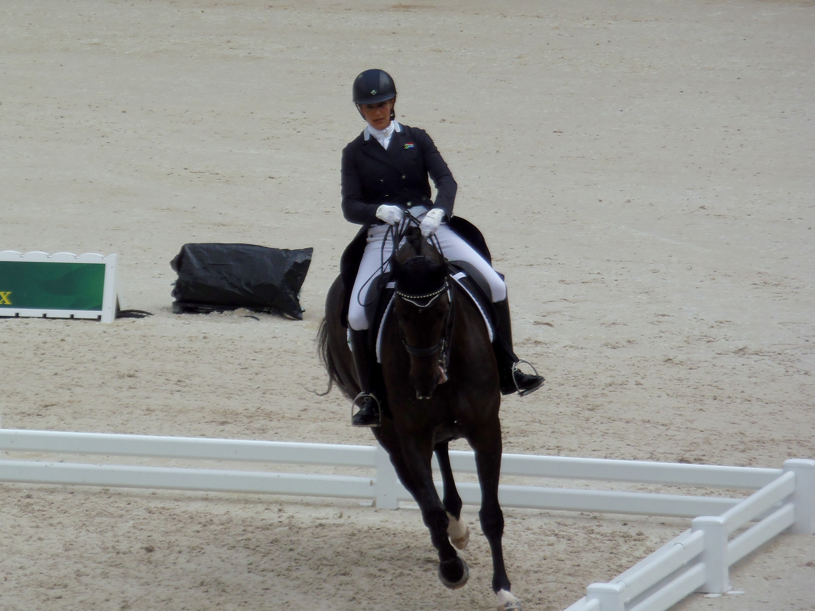 Denise Hallion en selle sur Wervelwind lors des Jeux équestres mondiaux, le 26 août 2014 au stade d'Ornano à Caen (Normandie, France).